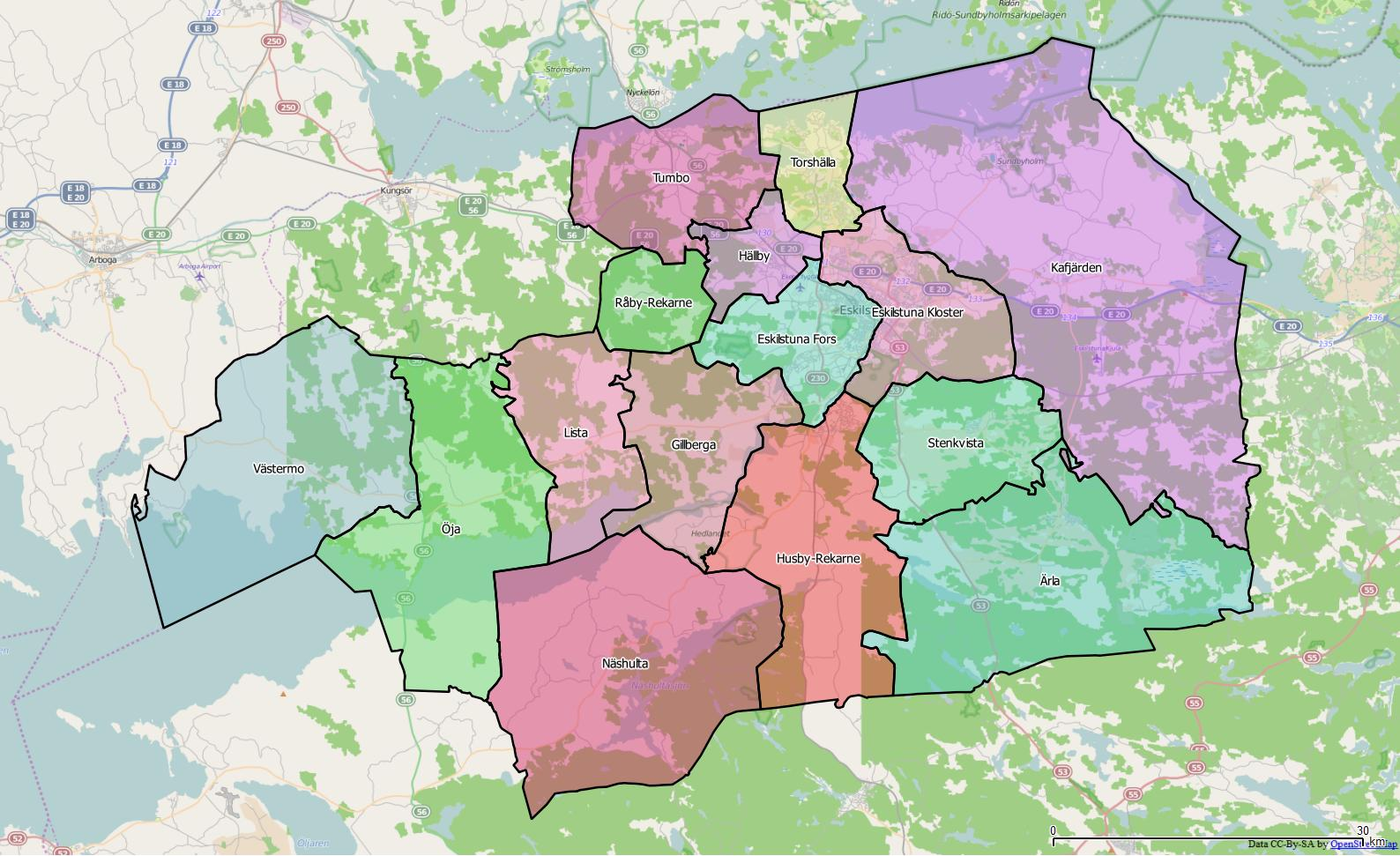 Distriktsindelningen i Eskilstuna kommun